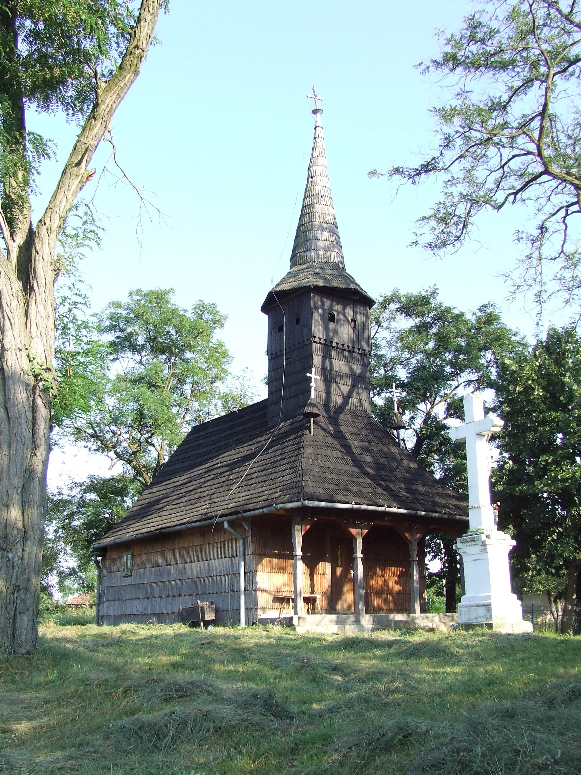 Biserica de lemn din Bolda, judeţul Satu Mare. Vedere din sud-vest.